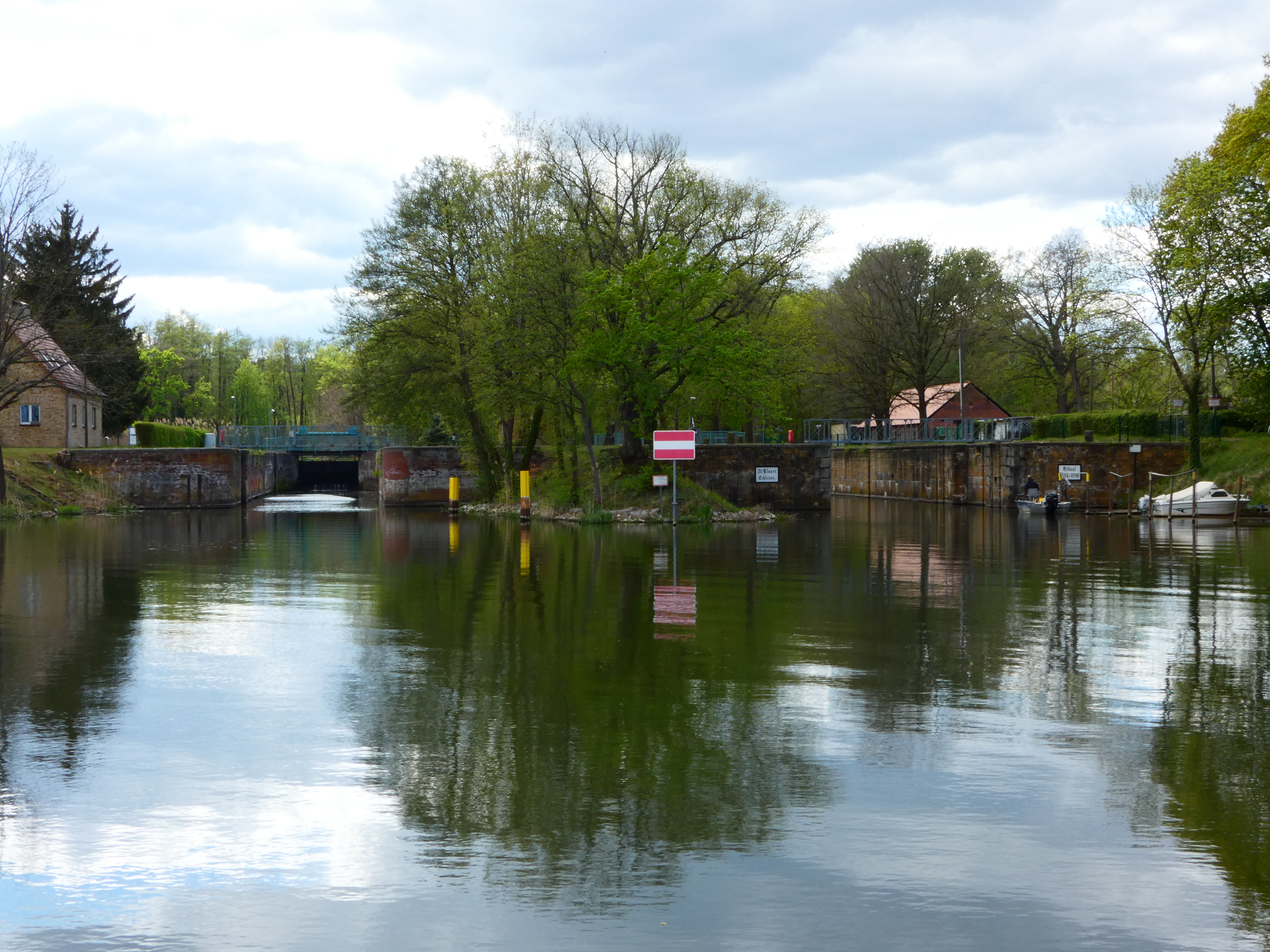 Blick auf die Schleuse Plaue vom Unterwasser